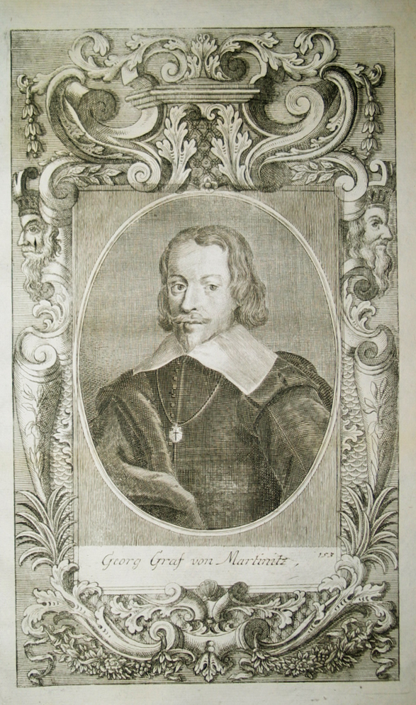 Georg Adam Graf von Martinitz (1602 - 1651): Georg Graf von Martinitz Kaiserlicher Kämmerer; Präsident der Böhmischen Kammer; Oberstkanzler des Königreichs Böhmen; Geheimrat.